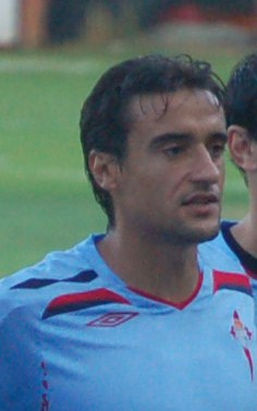 Francisco Noguerol, no 2009 xogando co RC Celta de Vigo o trofeo Cidade de Pontevedra.